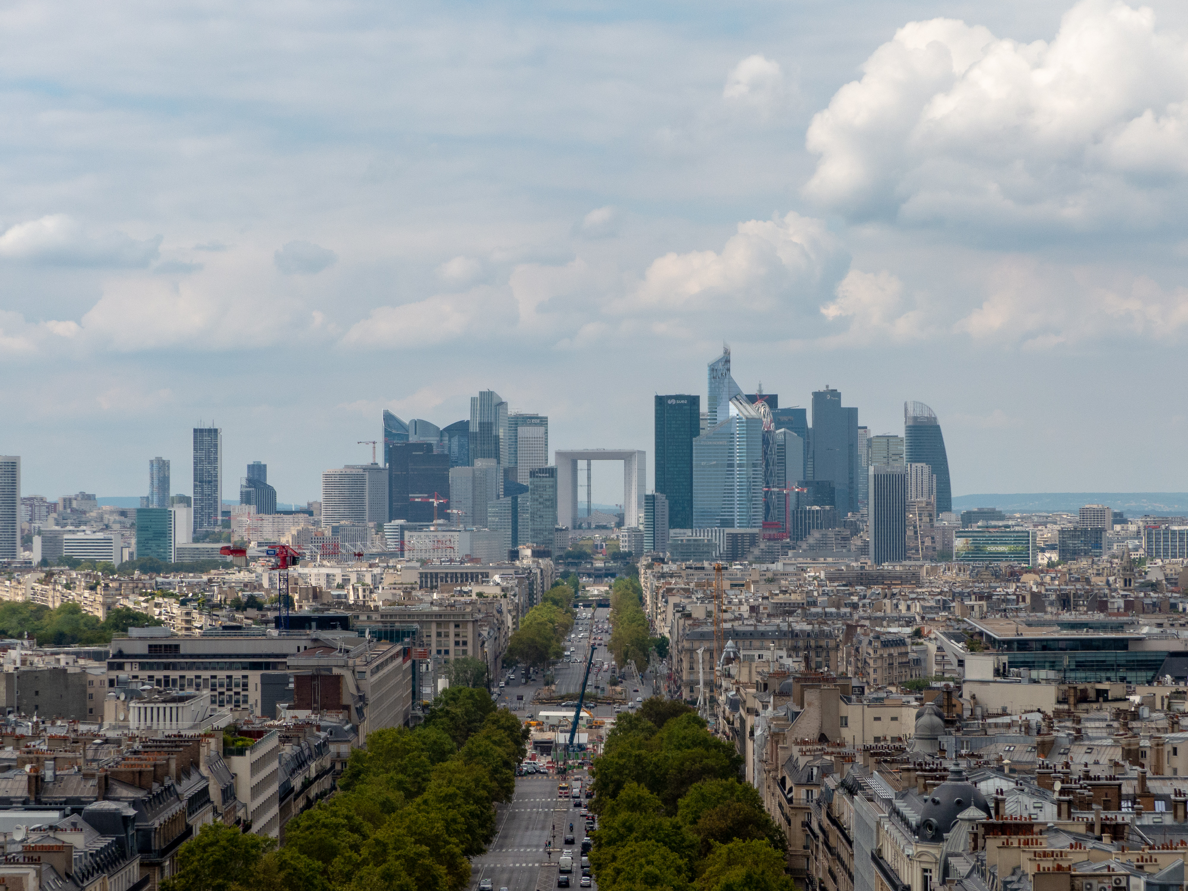 Vue depuis l'arc de Triomphe du quartier de La Défense et de l'avenue de la Grande Armée